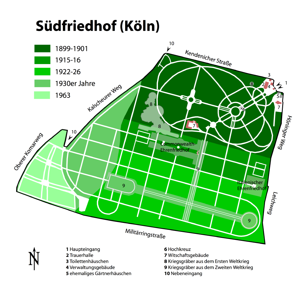 Köln Südfriedhof